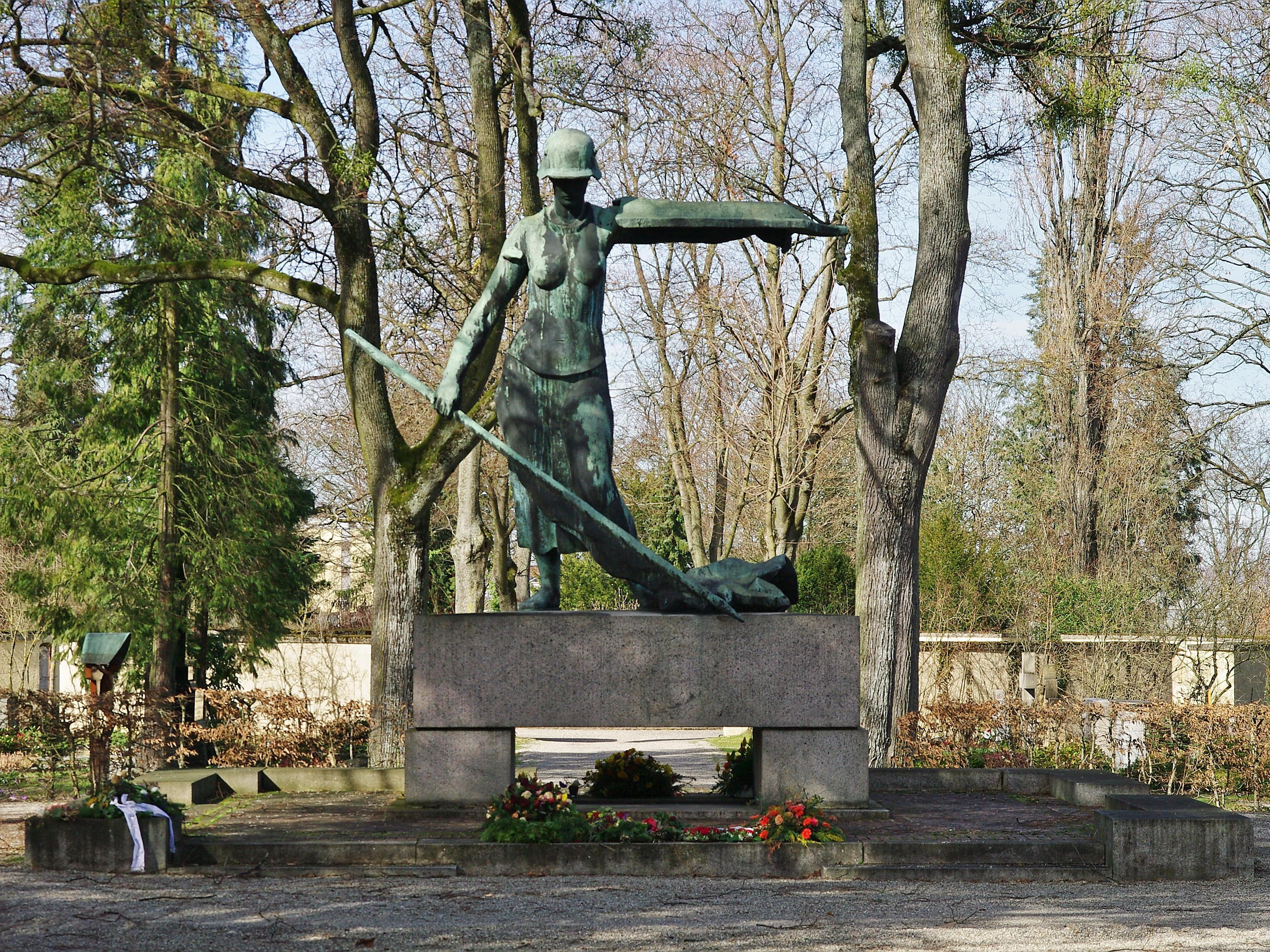 Bilder vom Hauptfriedhof Freiburg, der seit 1872 besteht